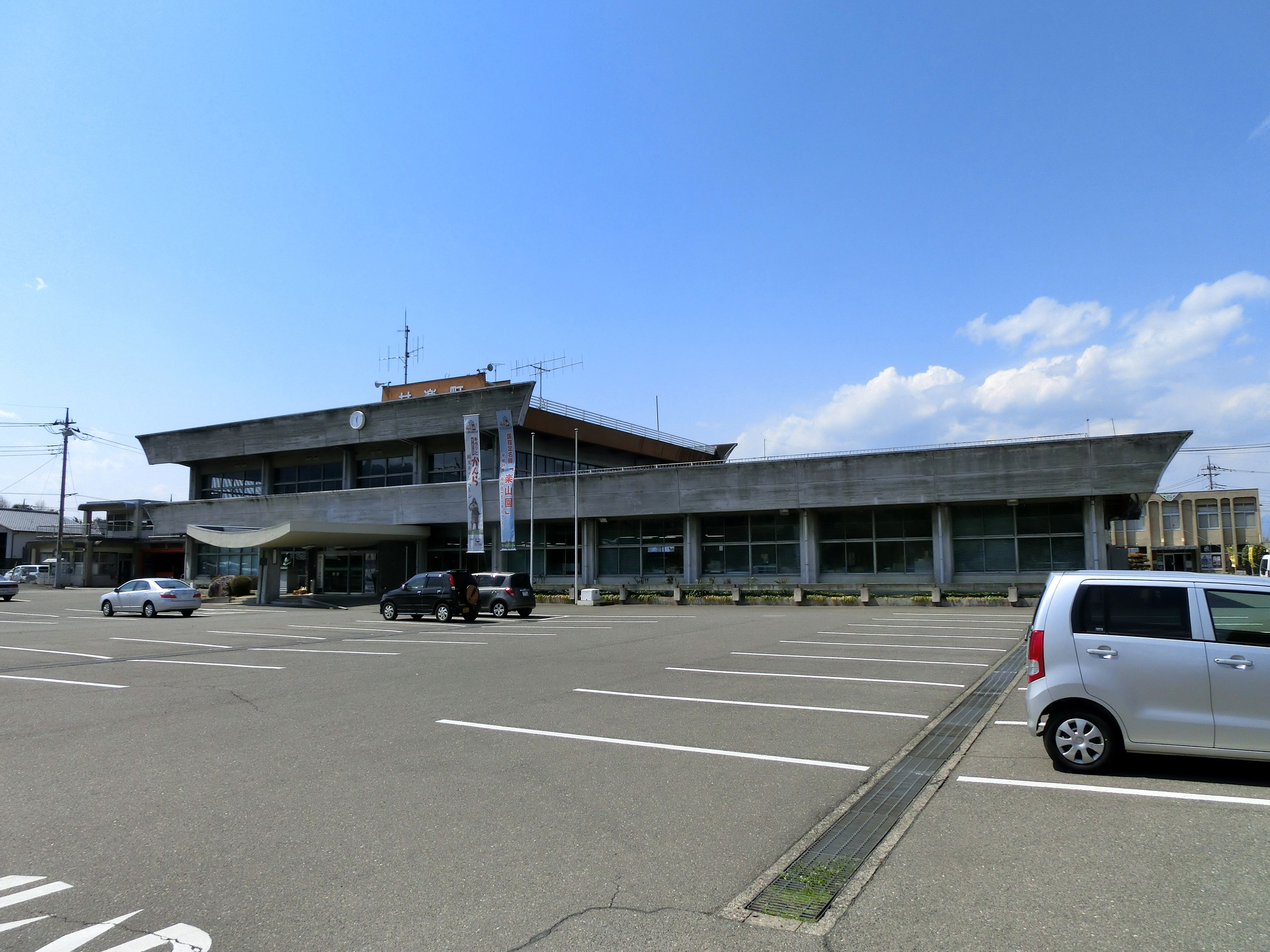 甘楽町役場